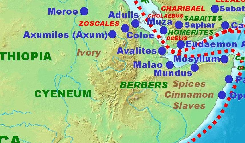 דרכי המסחר במאה ה-1 לפי השיוט בים האריתראי